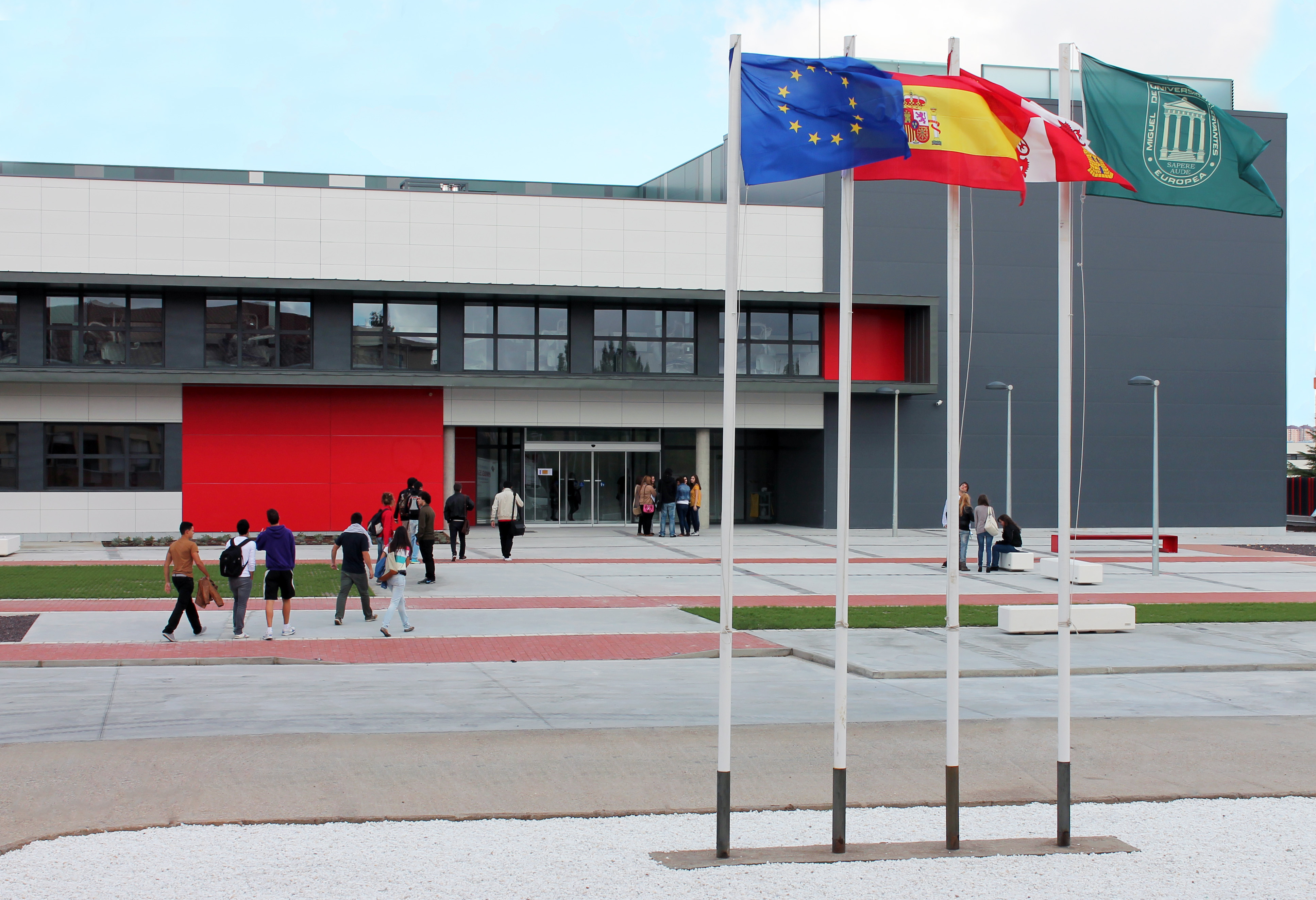 Plaza Central del Campus UEMC